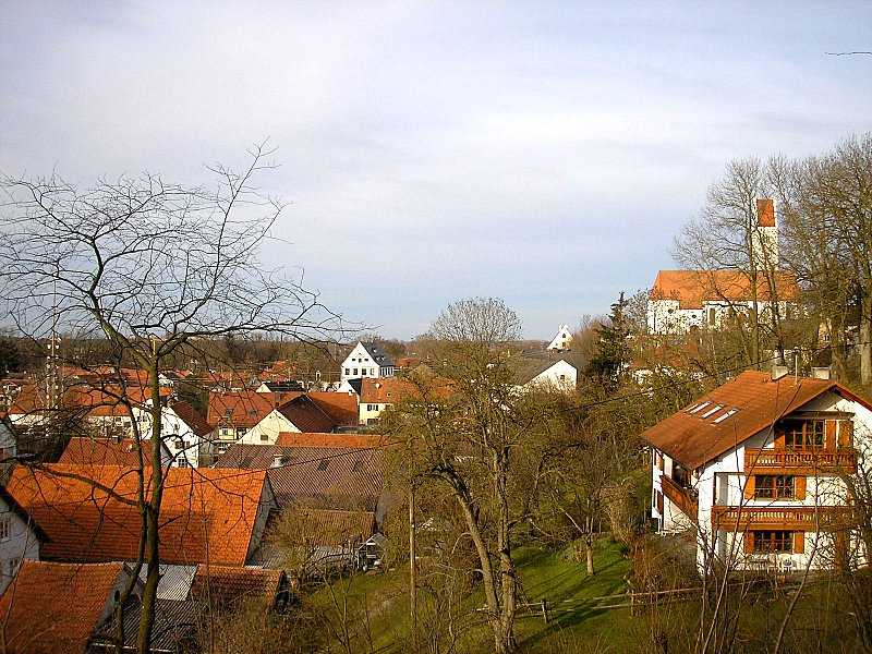 Blick vom Burgstall auf Altkissing (Kissing) bei Augsburg (Landkreis Aichach-Friedberg, Bayerisch-Schwaben). Eigene Aufnahme, Dez. 2006 / Kissing (Altkissing) near Augsburg (Bavaria, Germany). View from the "Burgstall" ("Motte-and-bailey" castle). Own photo, Dec. 2006